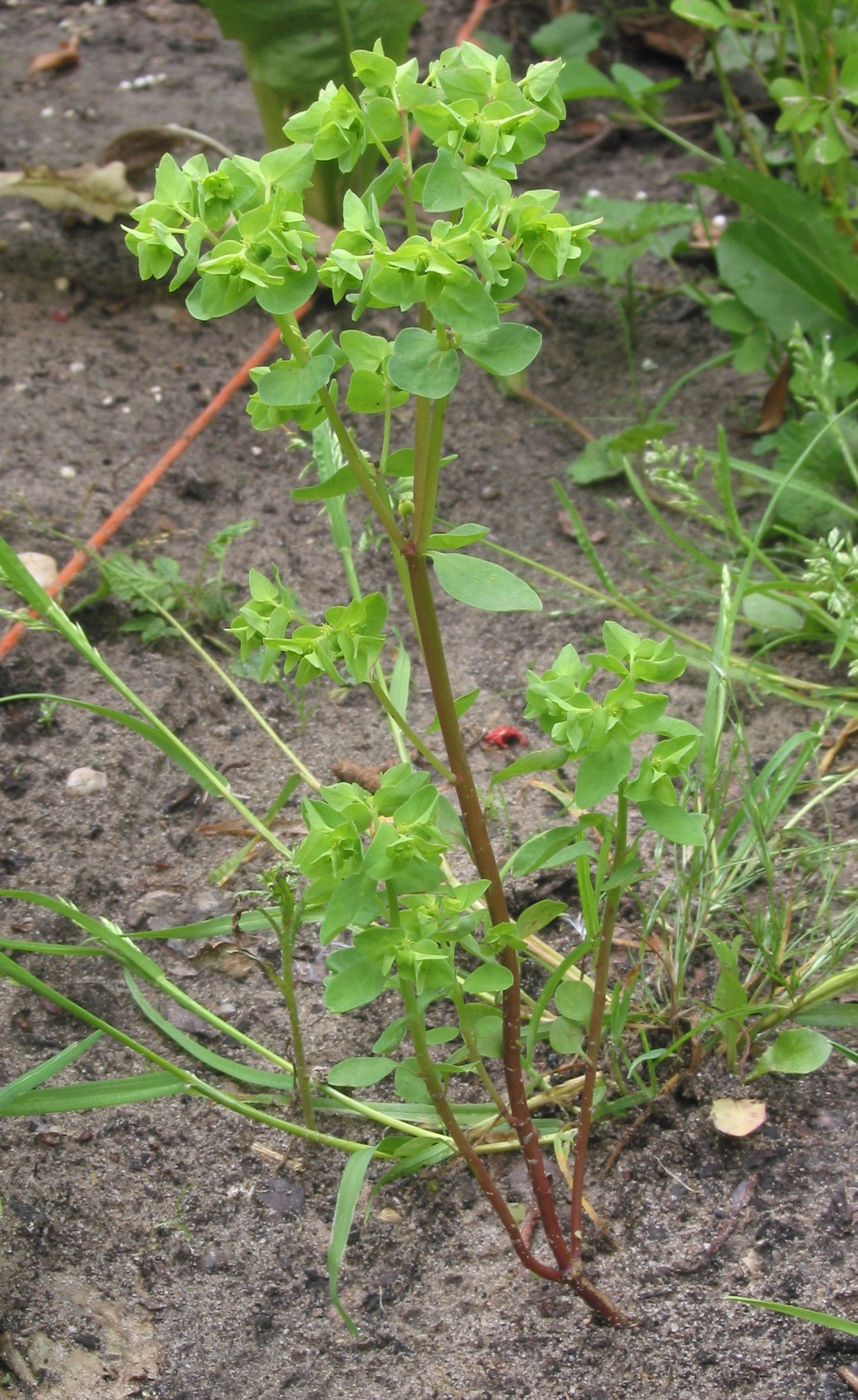 (nl: Tuinwolfsmelk) plant Euphorbia peplus